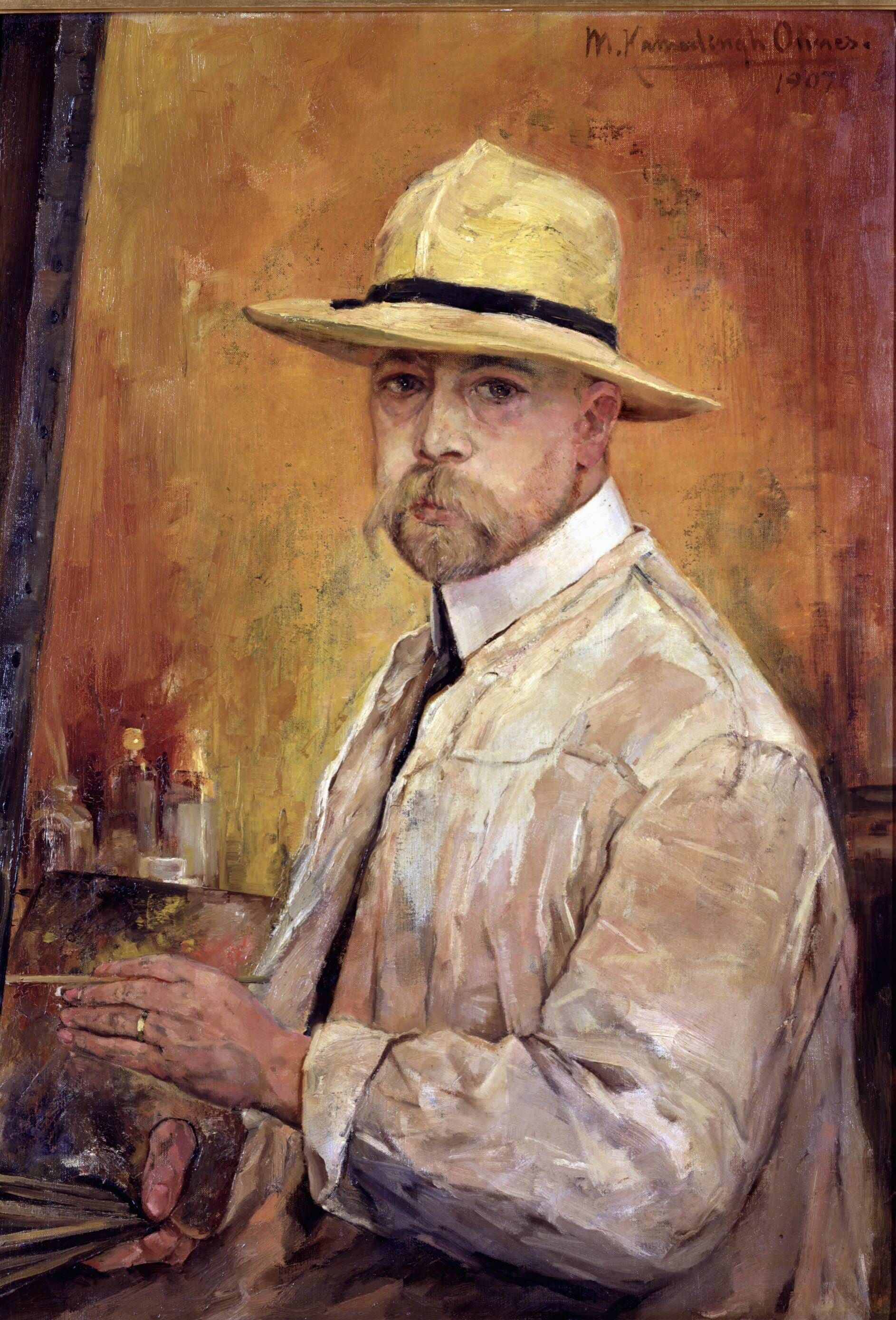 Zelfportret